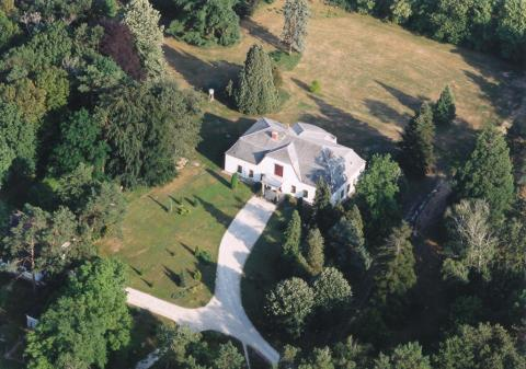 Pölöske, Hungary, aerialphotography